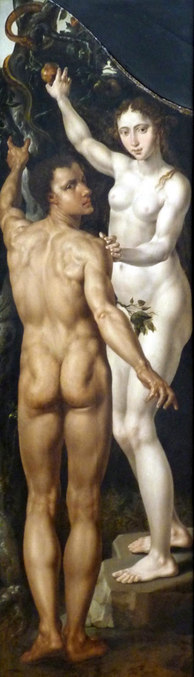 Gédéon ; Adam et Eve (vers 1550), huiles sur bois de Martin van Heemskerck, au Musée des Beaux-Arts de Strasbourg. A l'origine, un tableau (perdu)avec la Vierge était placé entre les deux panneaux.